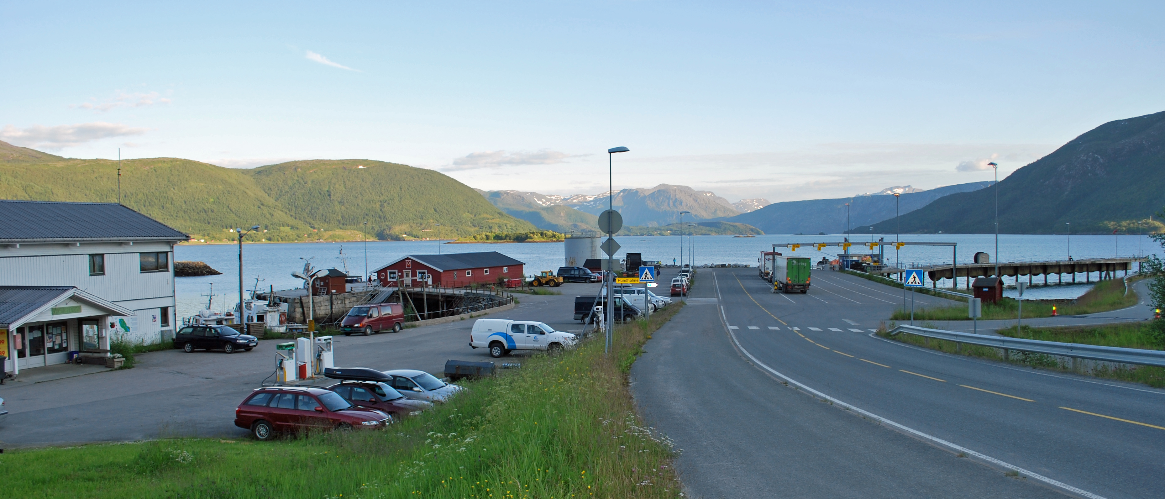 Kjøpsvik fergeleie